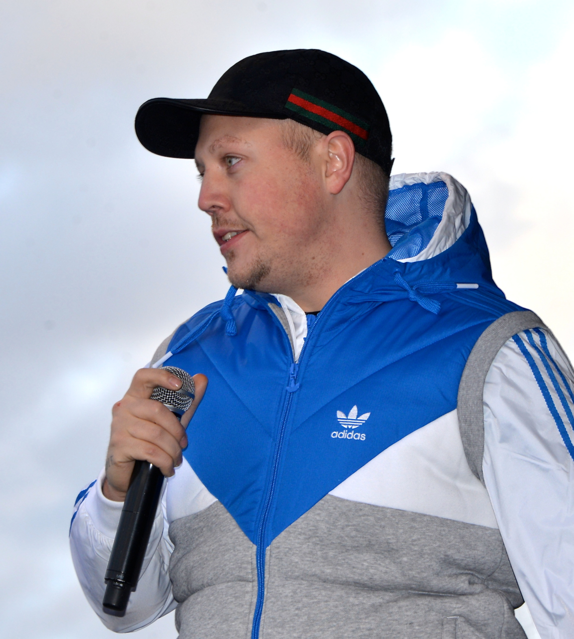 Antirasistdemonstrationerna i Kärrtorp den 22 december 2013.